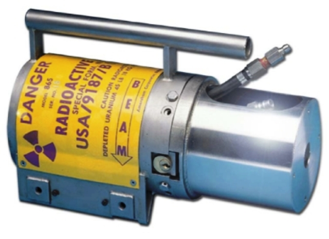 Radiografía subacuática